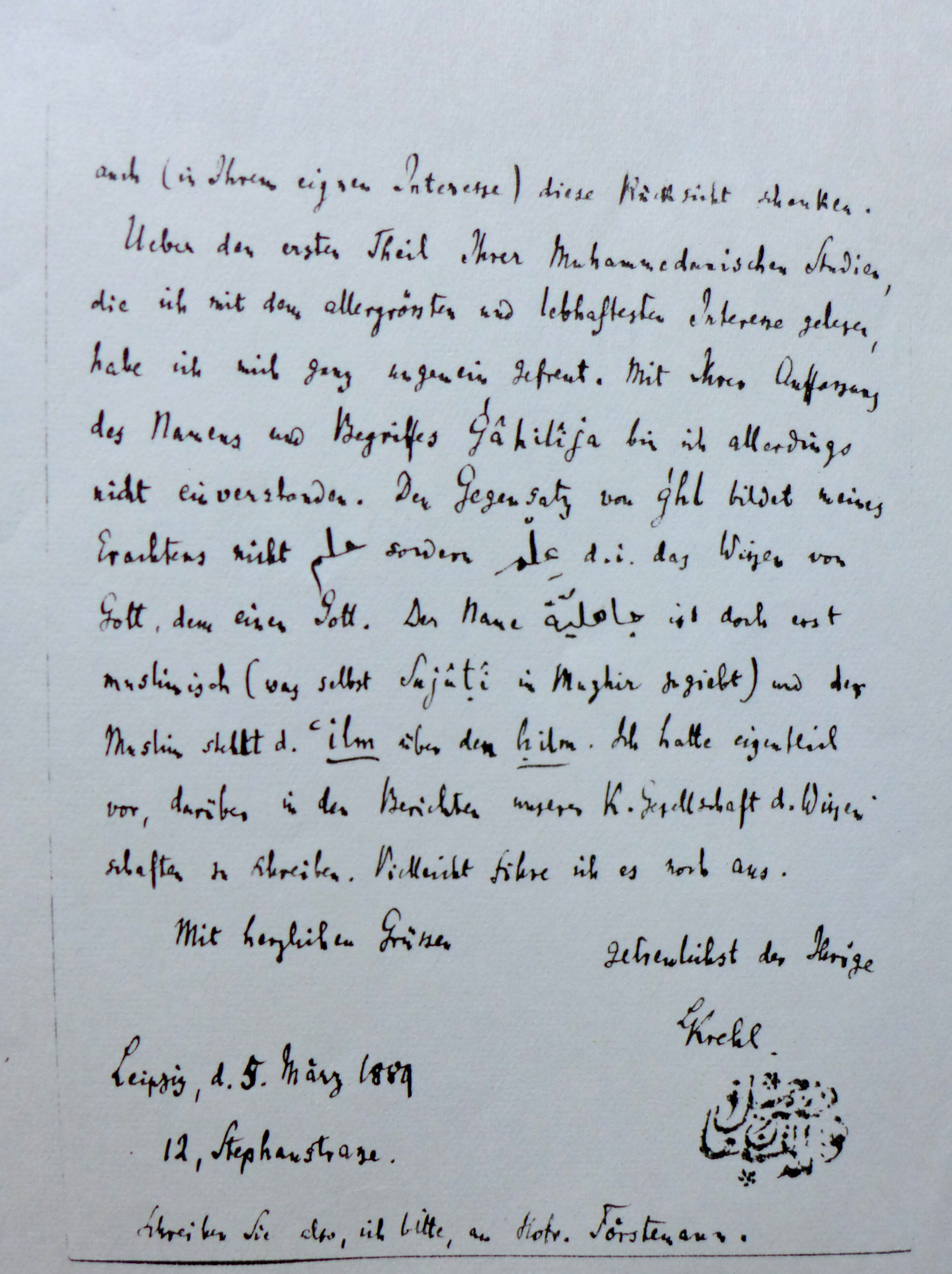 Schreiben des deutschen Orientalisten Krehl an Goldziher (Auszug). Reproduktion vom Original